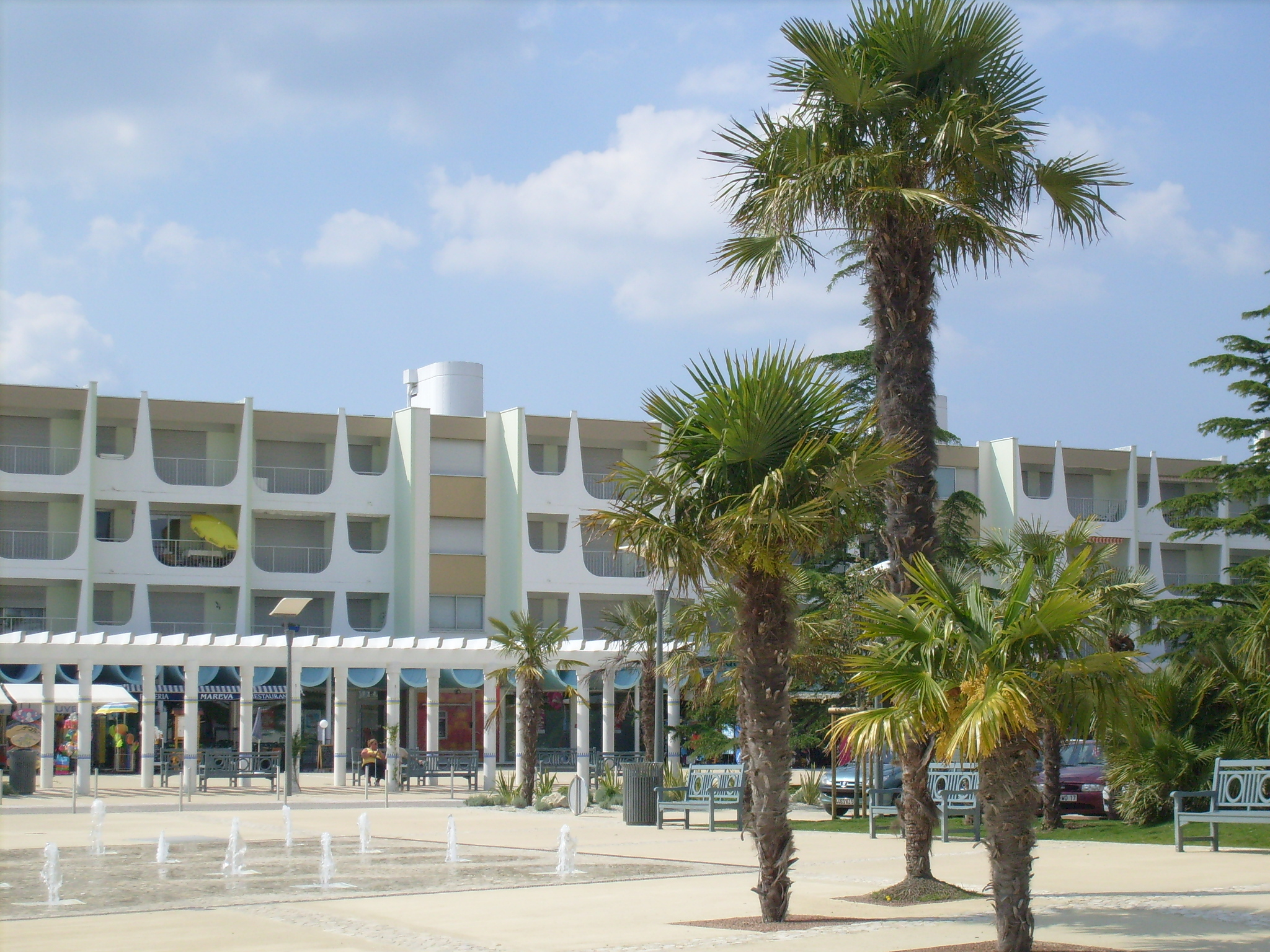 La place du commerce, et place Cheyroux, au centre de la ville de Saint-Palais sur mer, en Charente-Maritime